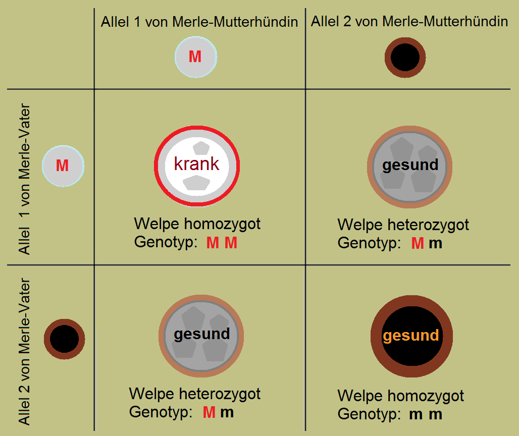 Merle-Gen